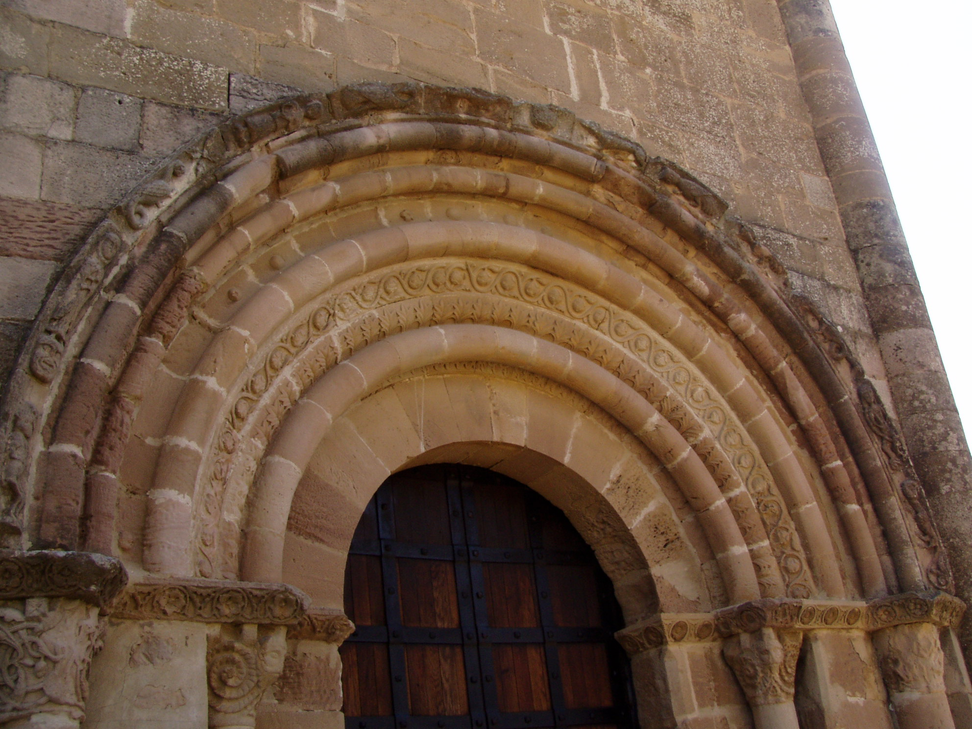 le portail de la chapelle de Santa Maria de Eunate